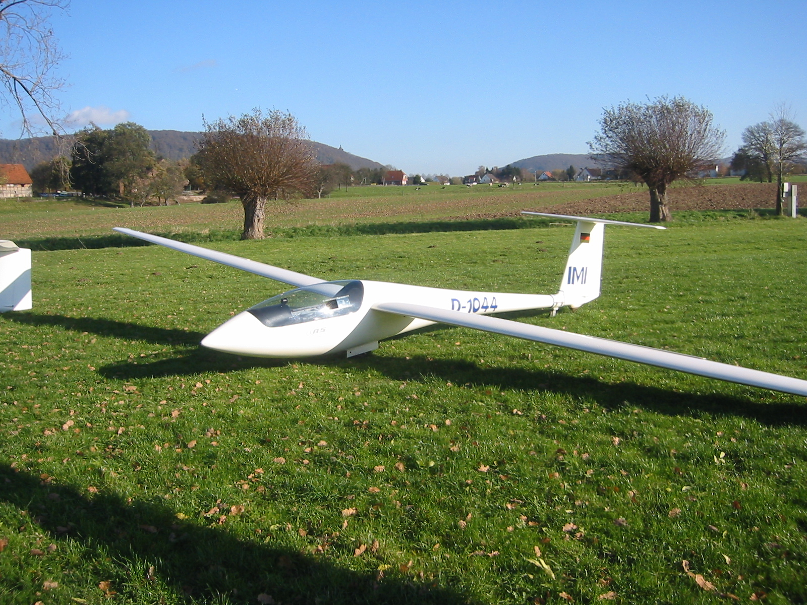 Schleicher ASW19b